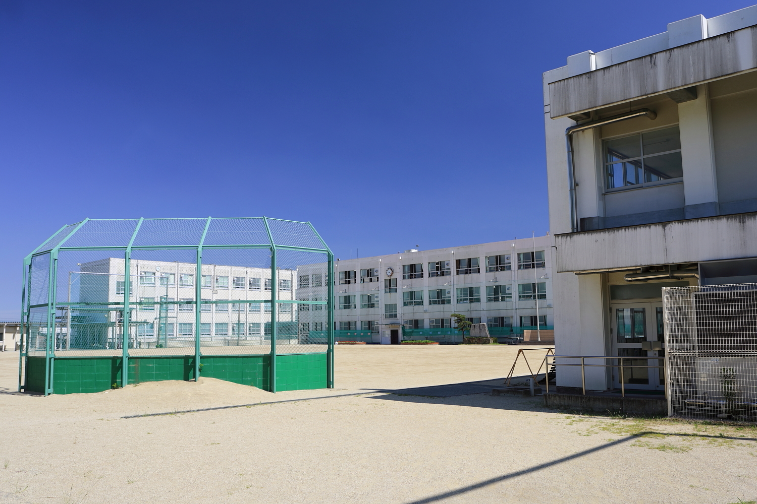 名古屋市立有松小学校外観（名古屋市緑区有松、2020年（令和2年）6月） Canon EOS 5D Mark IV